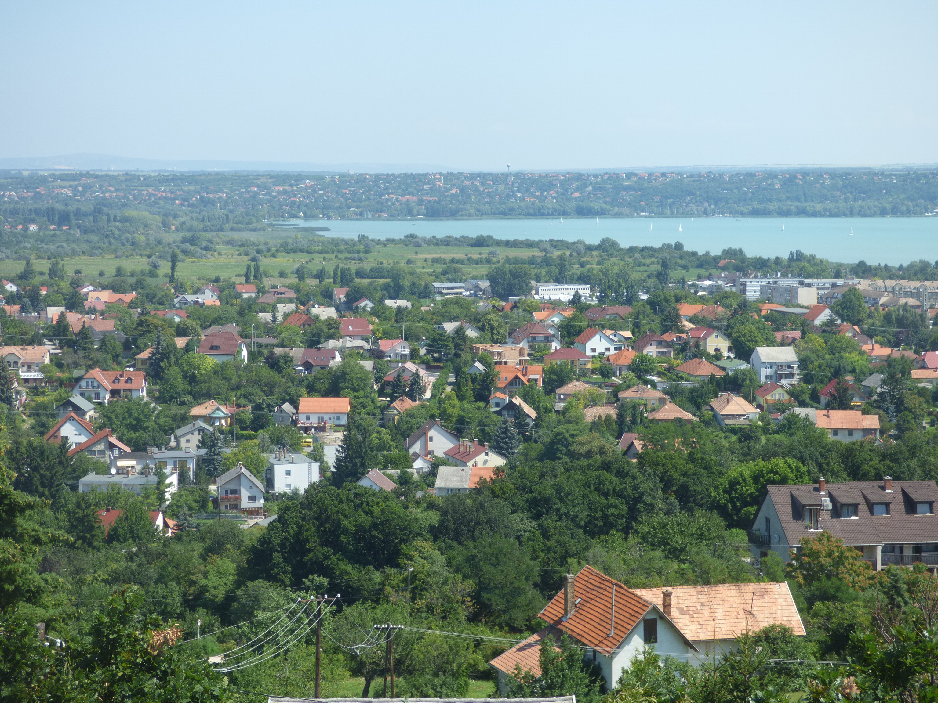 Kilátás a balatonalmádi Óvári Messzelátóból Balatonfűzfő felé